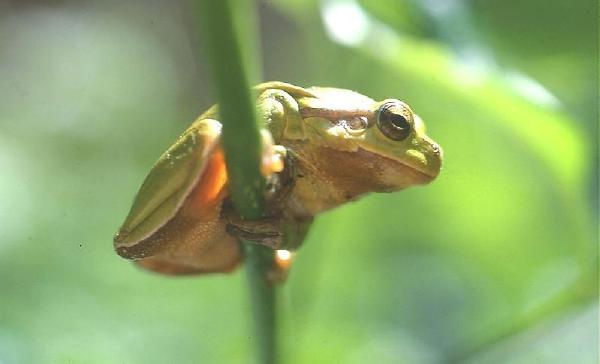 Hyla arborea